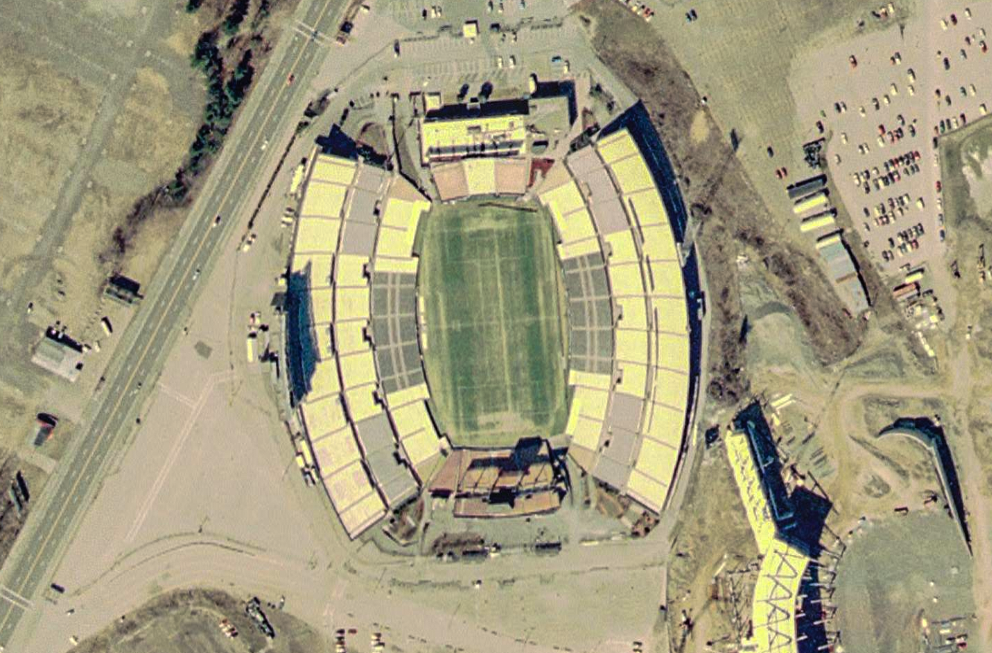 Foxborostade